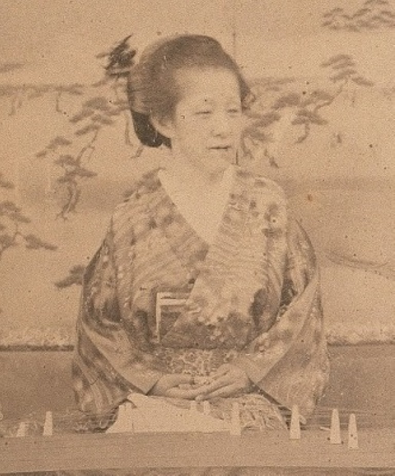 勇姫の肖像写真。